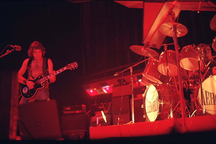 Show en el Teatro Premier, 1977, archivo de Rolando Castello Junior